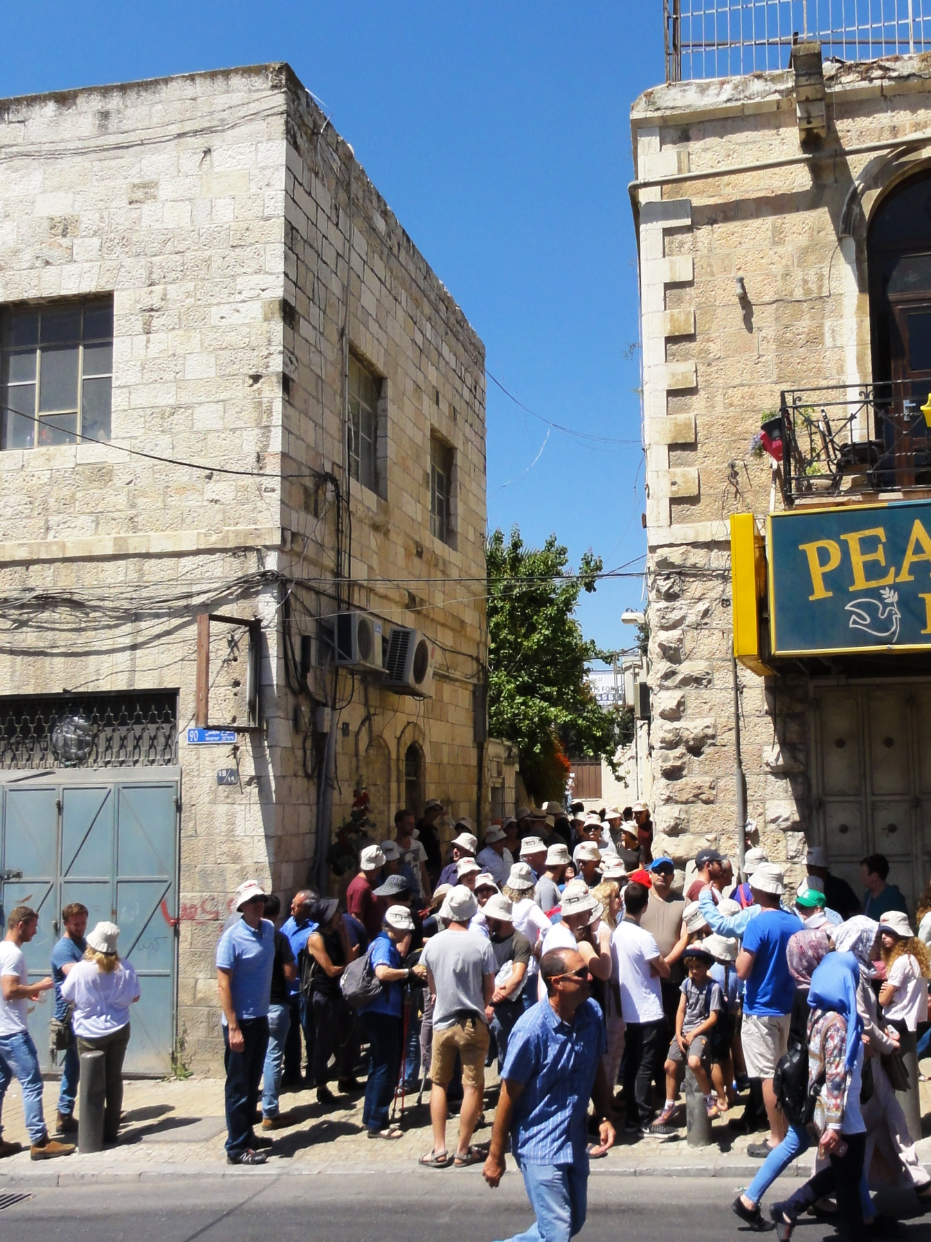 סיור "חוזרים לסמטה 1967-2017". יום ו', 12 במאי 2017